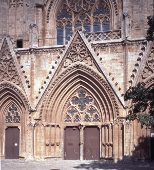 Lala Mustafa Cami, Gazimagusa, TCCK